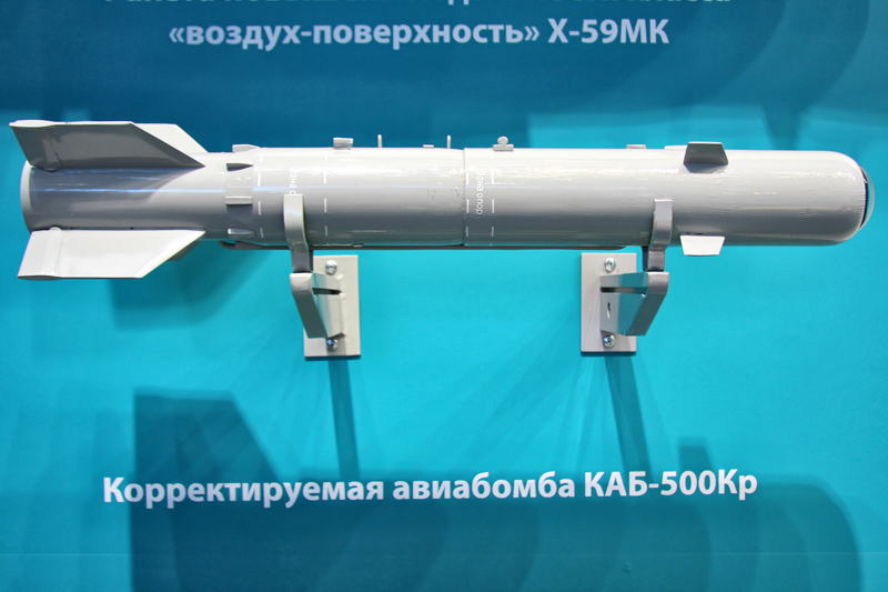 Корректируемая авиабомба КАБ-500Кр (Guided bomb KAB-500Kr)